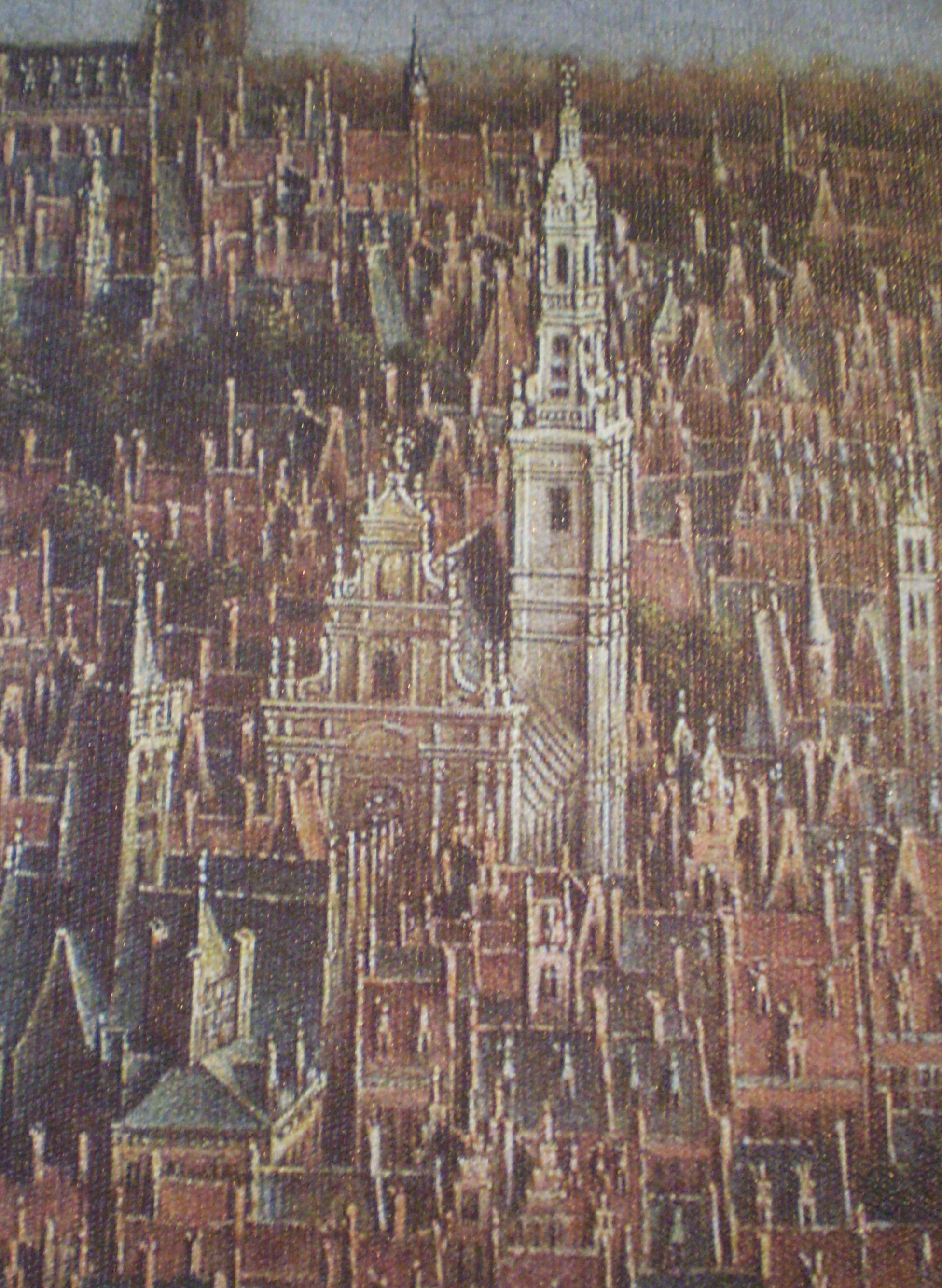 Église des jésuites de Bruxelles, vers 1664. Détail de la «Vue de Bruxelles» de Jan Baptist Bonnecroy - Musée des Beaux-Arts de Belgique